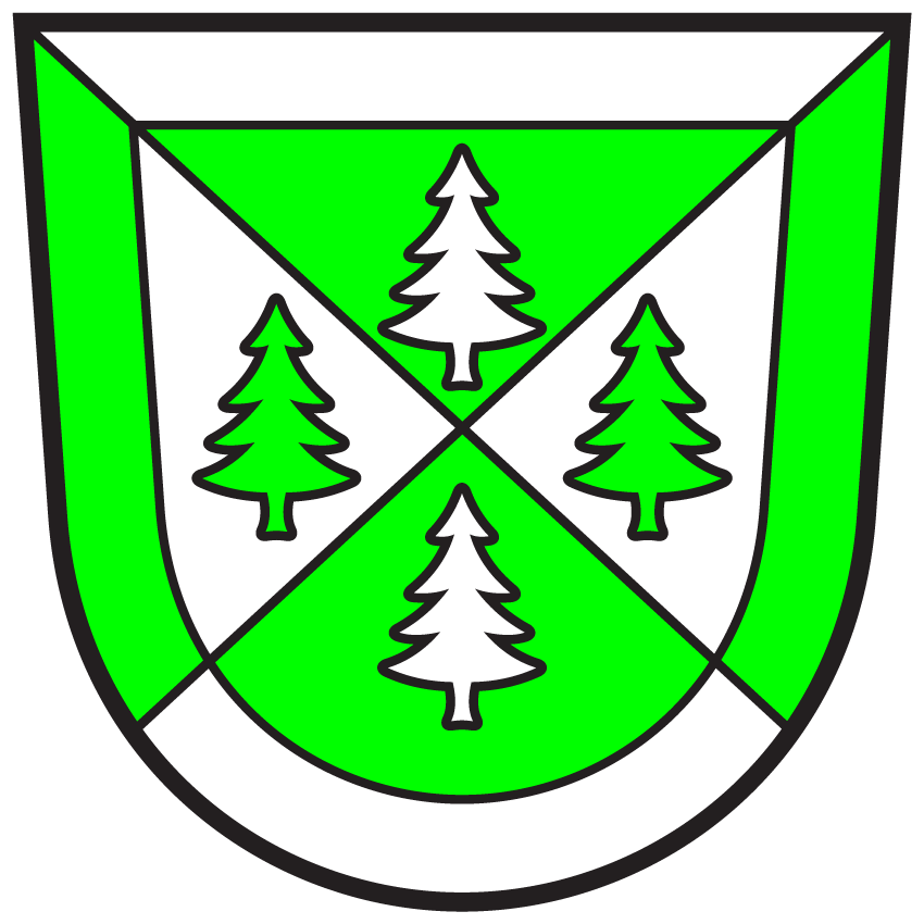 Wappn von Lesachtal